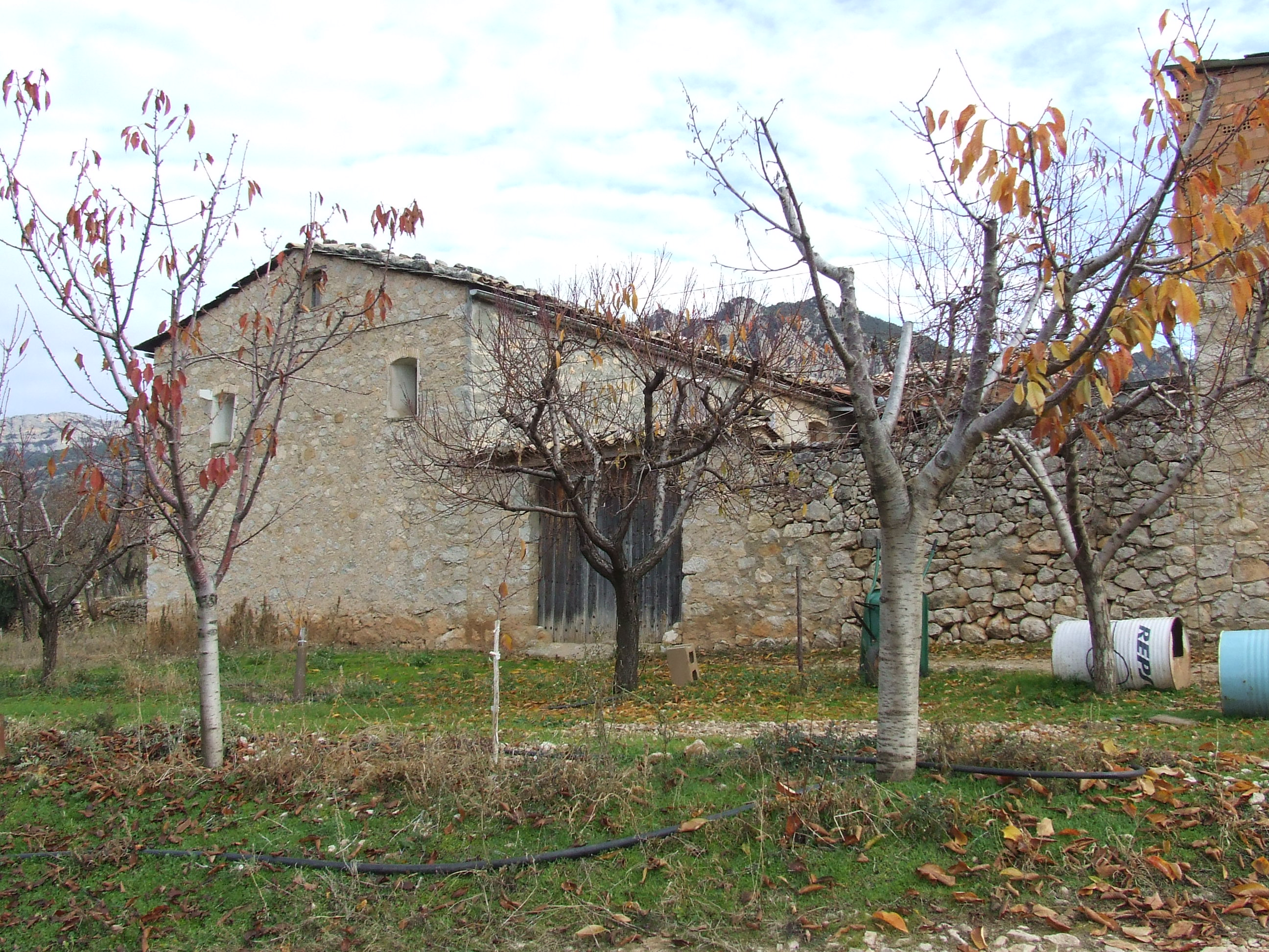 Cal Manjo (Abella de la Conca, Pallars Jussà)